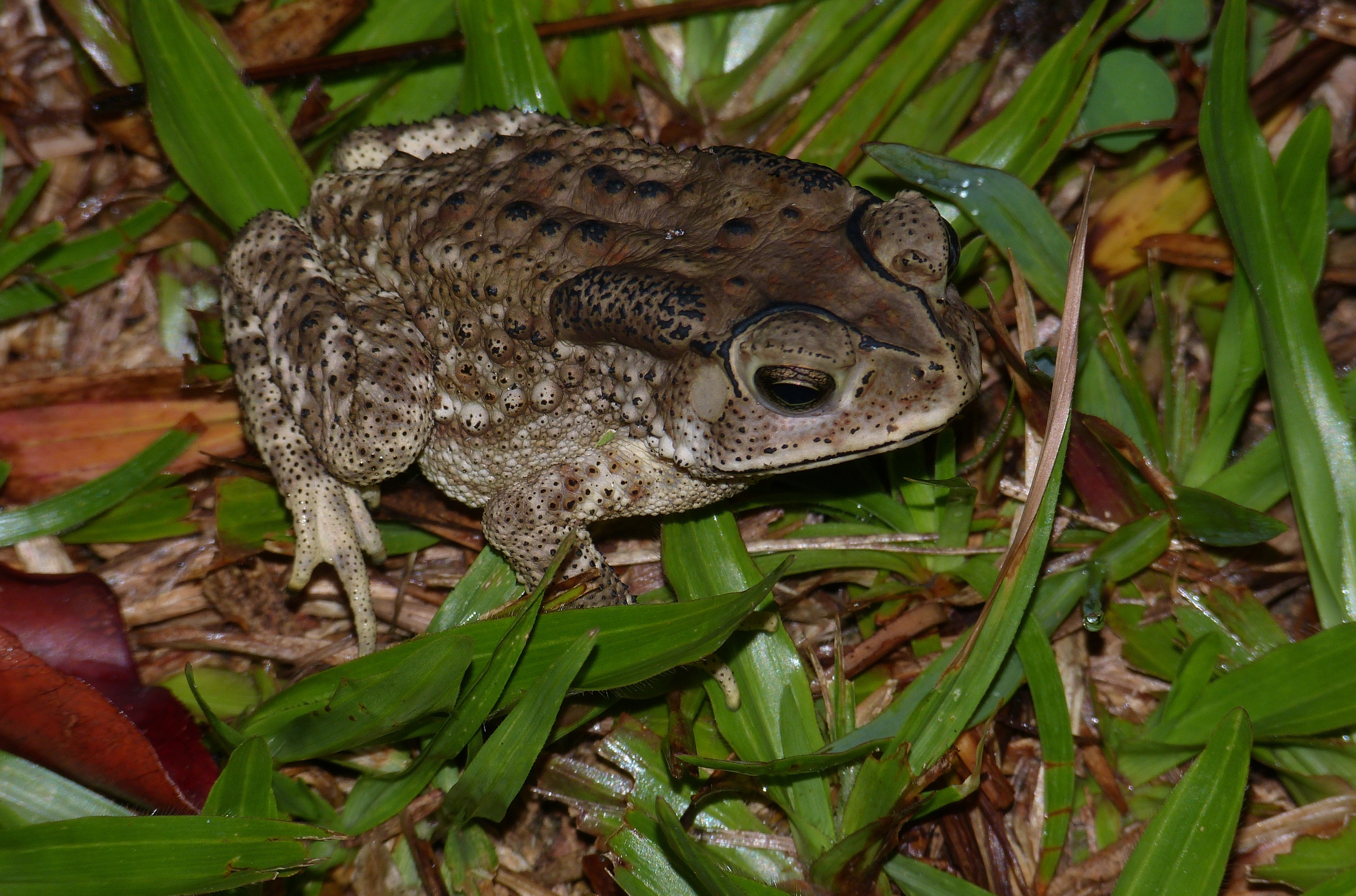 Kuala Tahan, Pahang, MALAYSIA